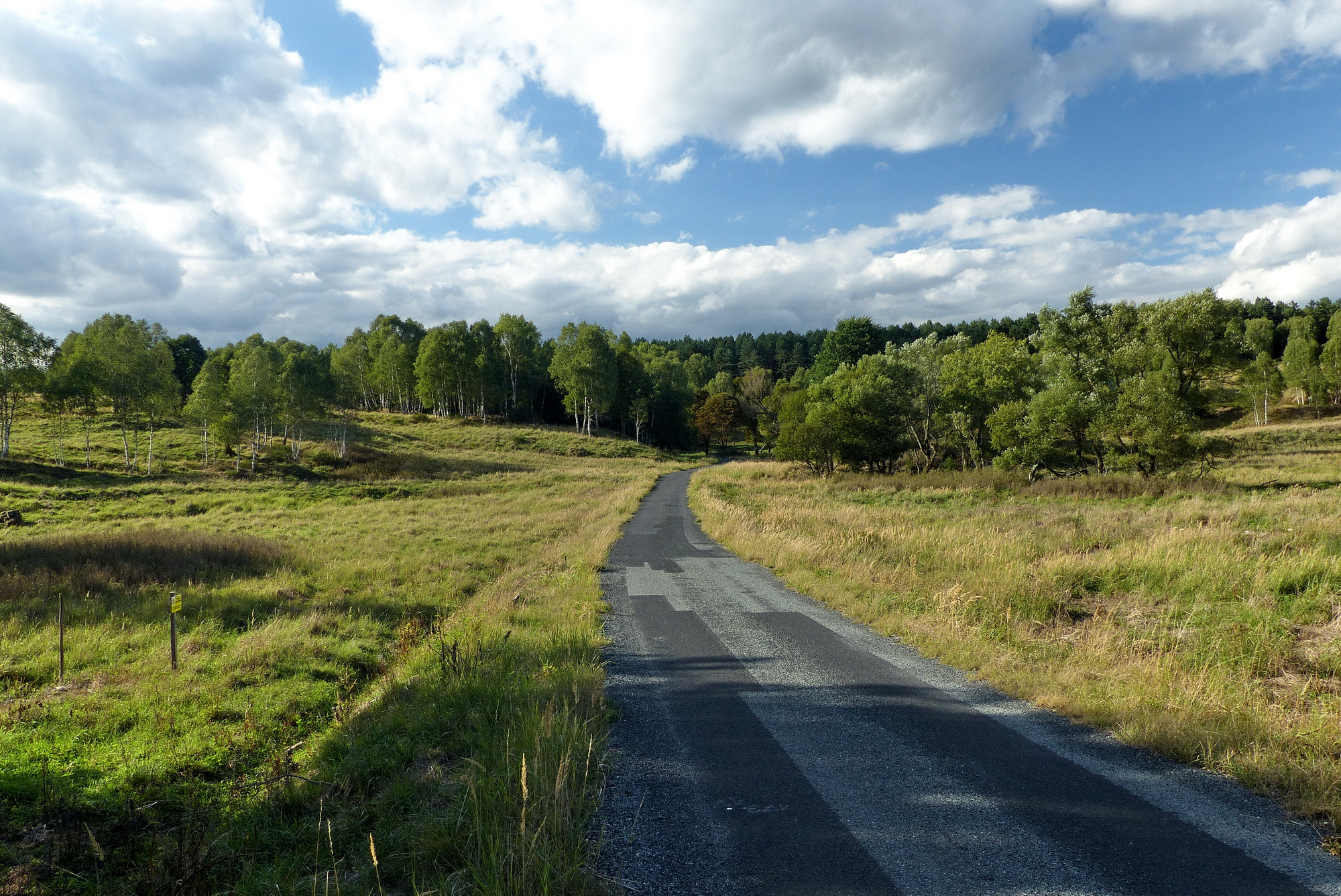 Silnice skrz bývalá Okna v Ralsku